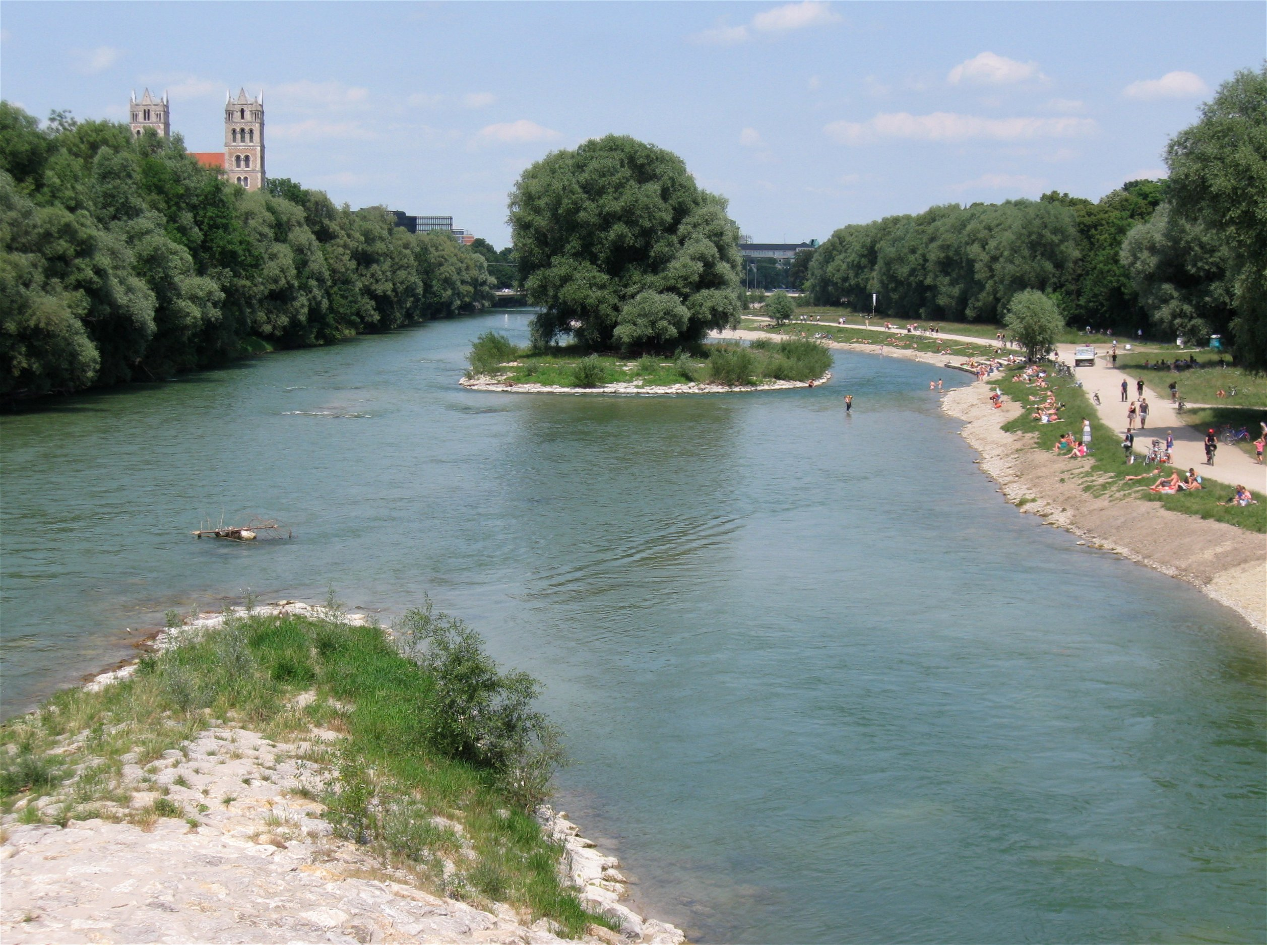 Isar von der Wittelsbacher Brücke aus gesehen, München